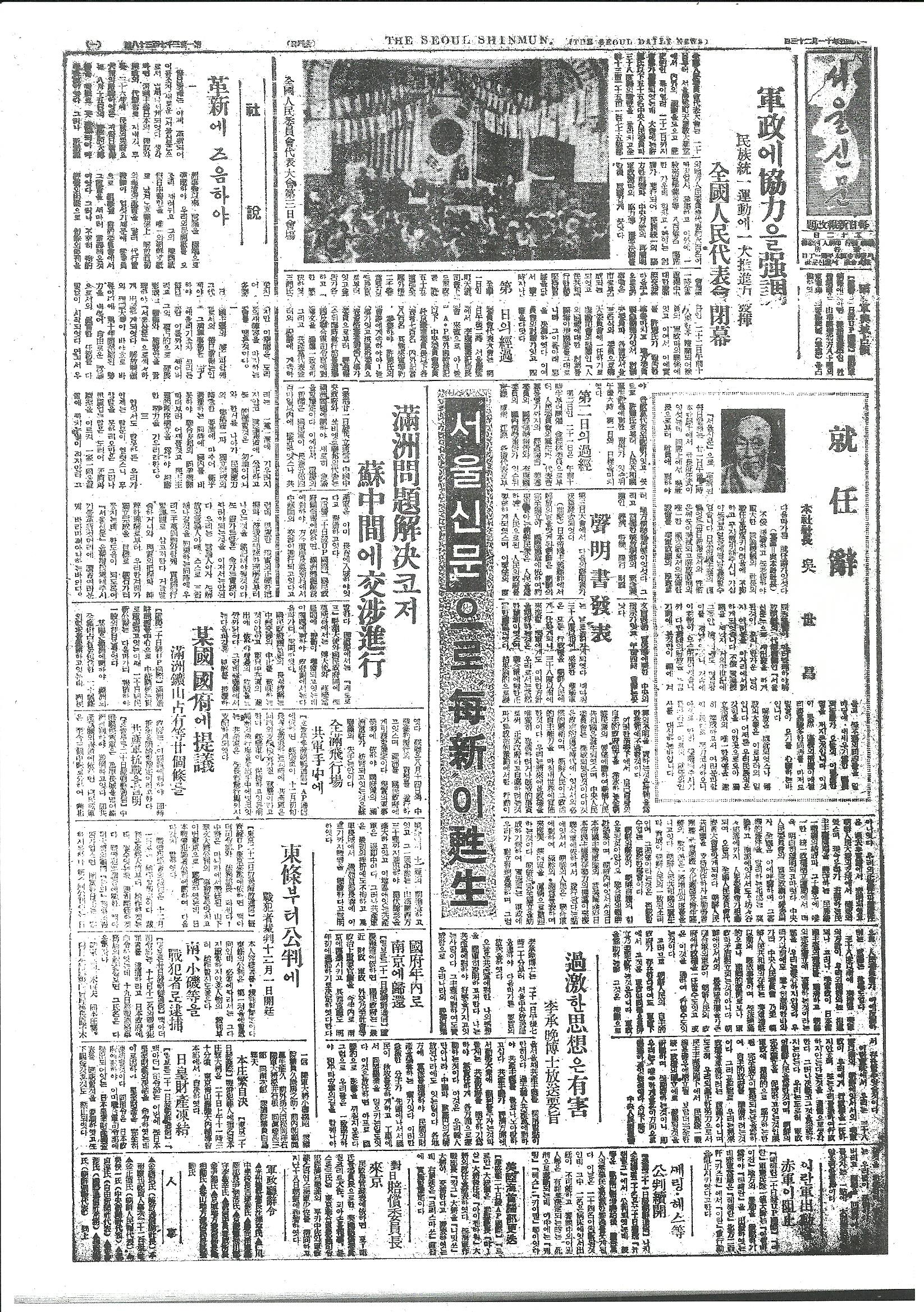 1945년 11월 23일자 서울신문(해방공간 4대신문 영인본 - 서울신문 1에서 가져옴)